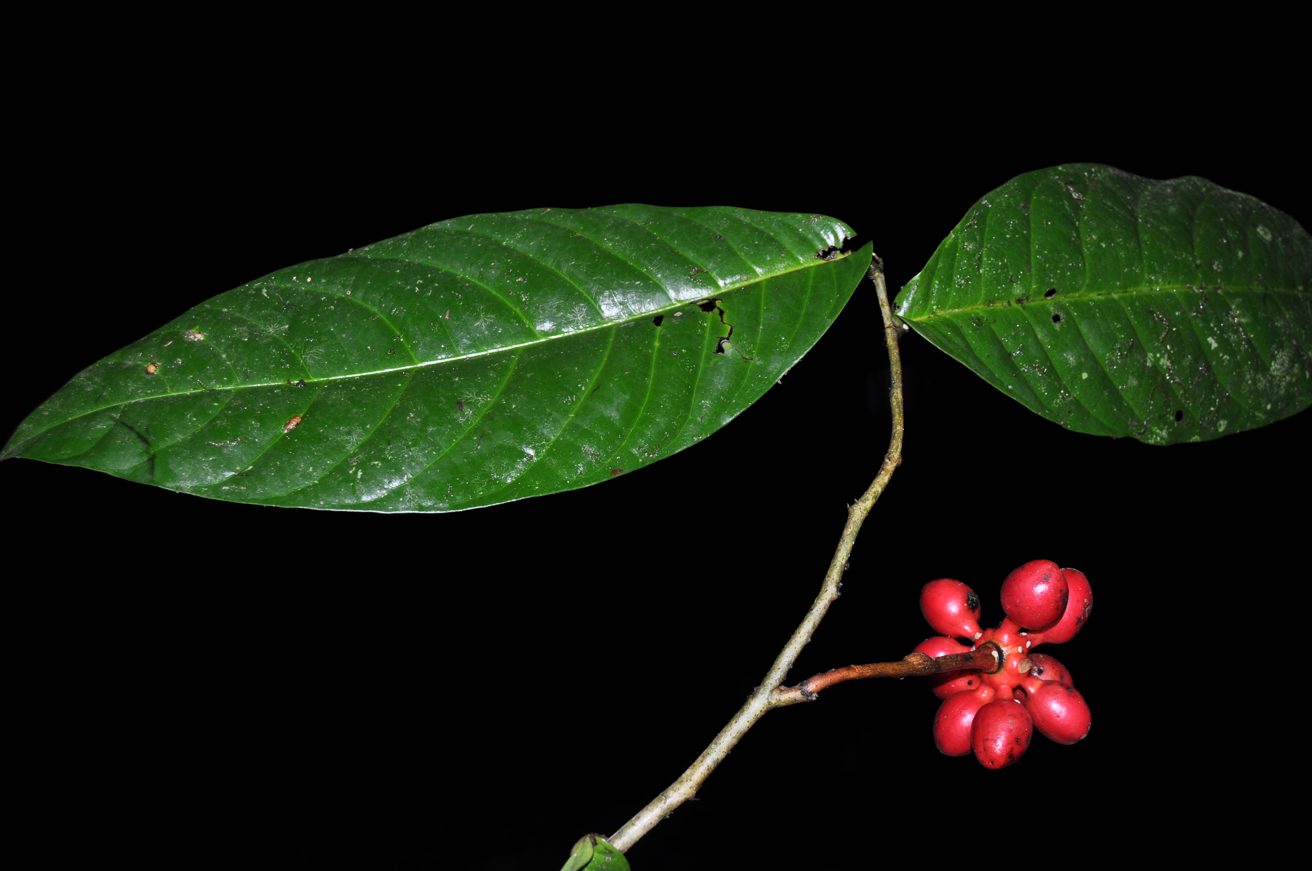 Frutos y hojas Desmopsis heteropetala